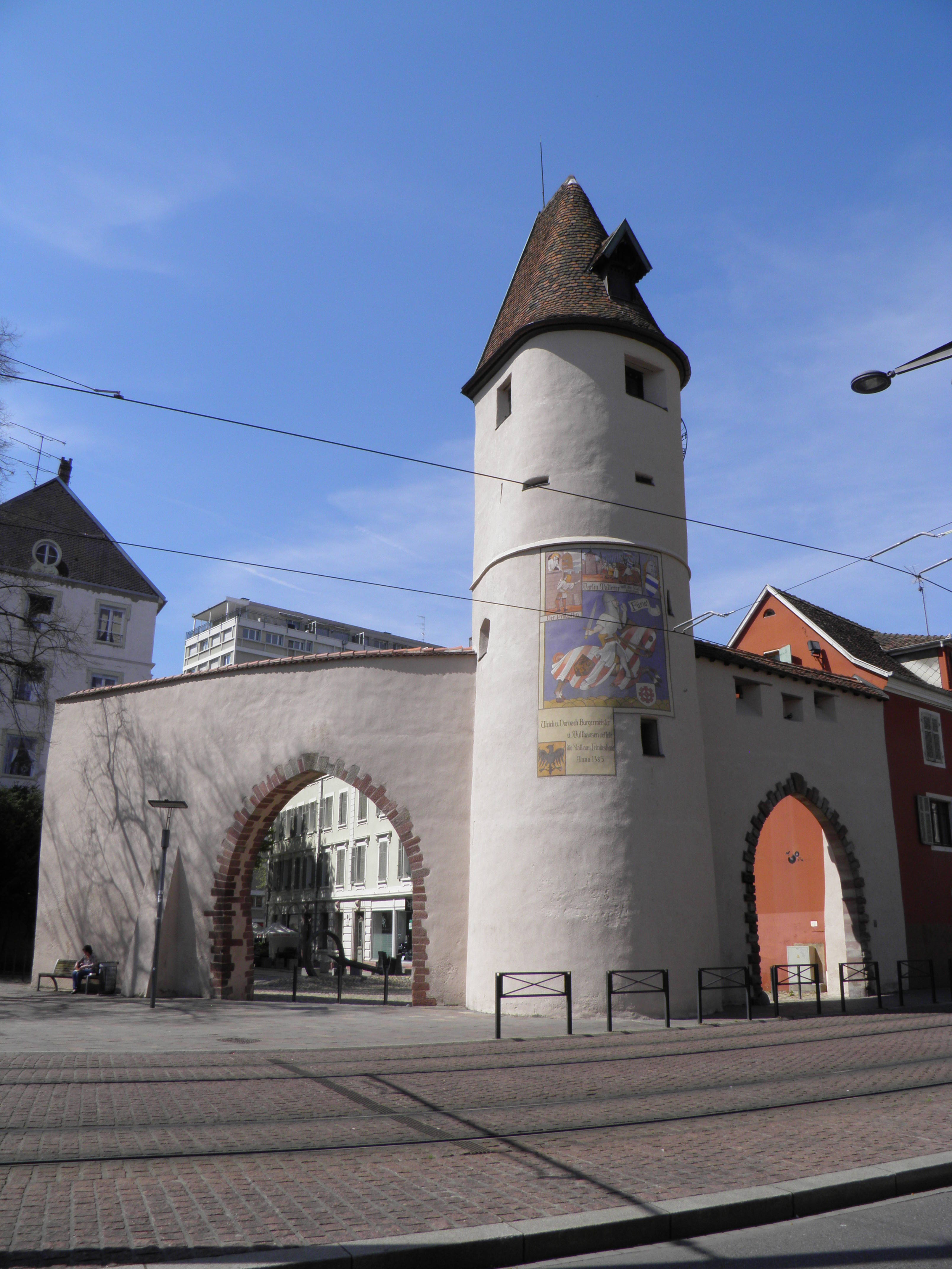 Bollwerk à Mulhouse (Haut-Rhin, France).